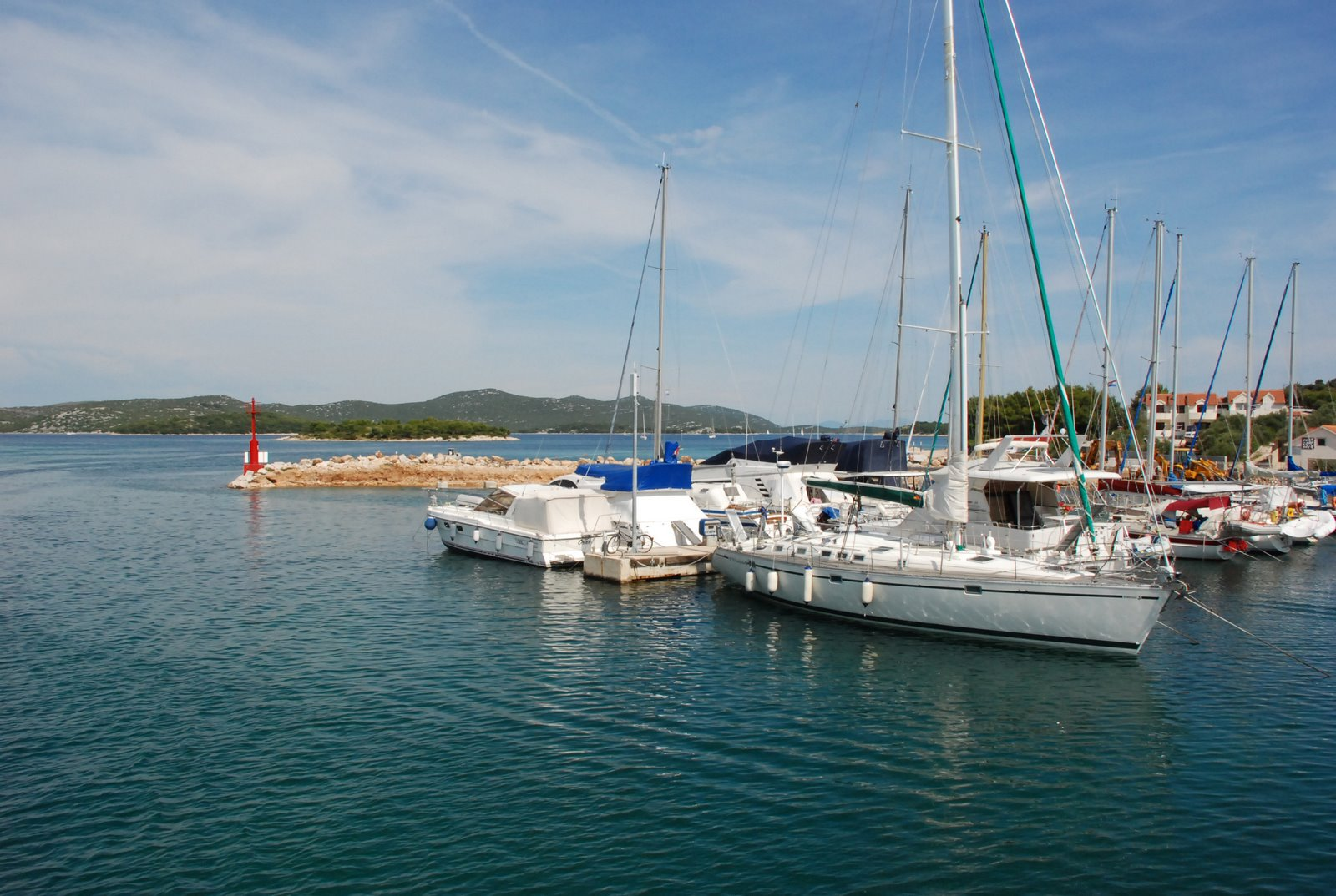 Murter city (Croatia) - marina